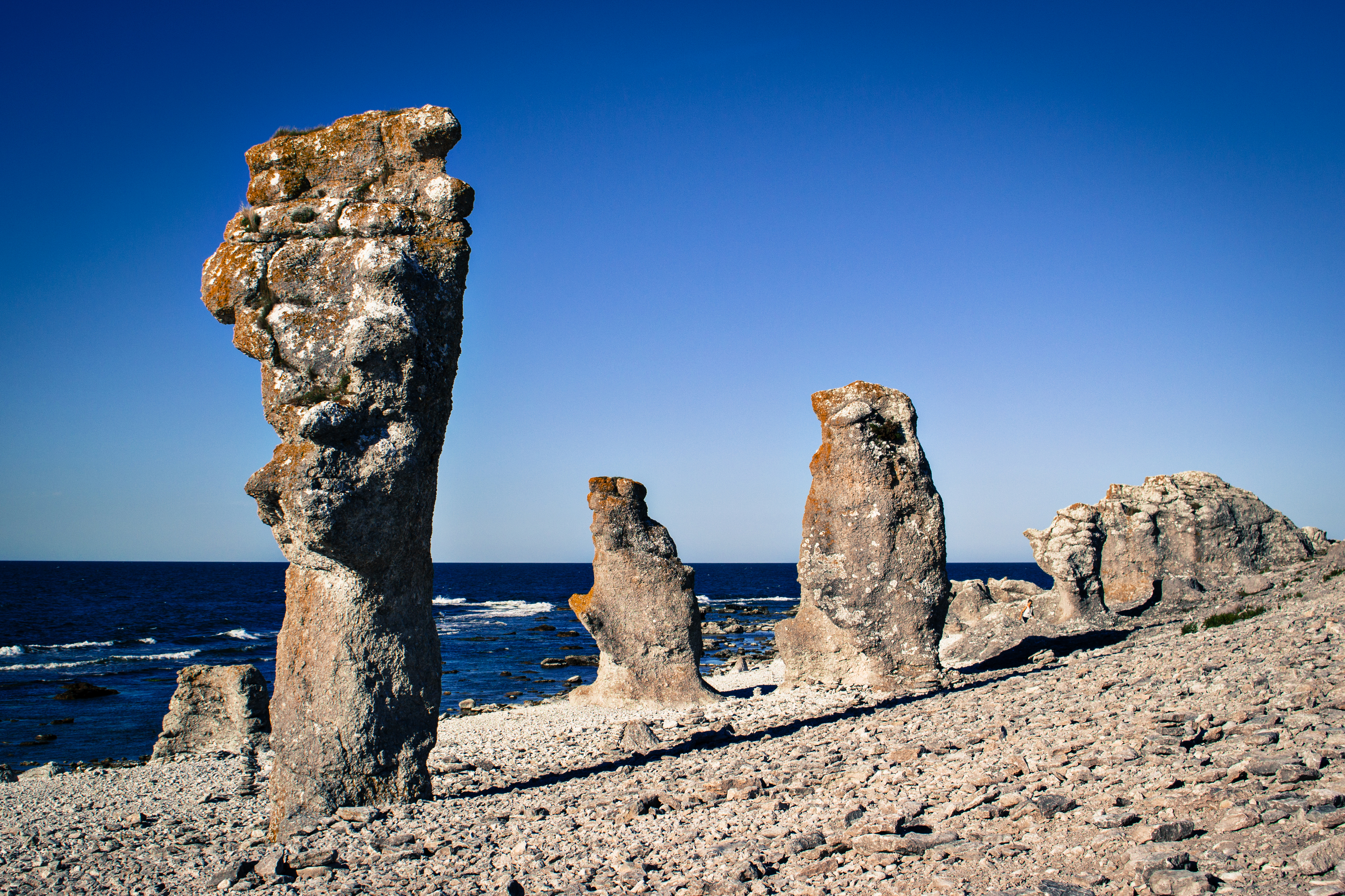 Rauks de Langhammar, en Fårö, Gotland.